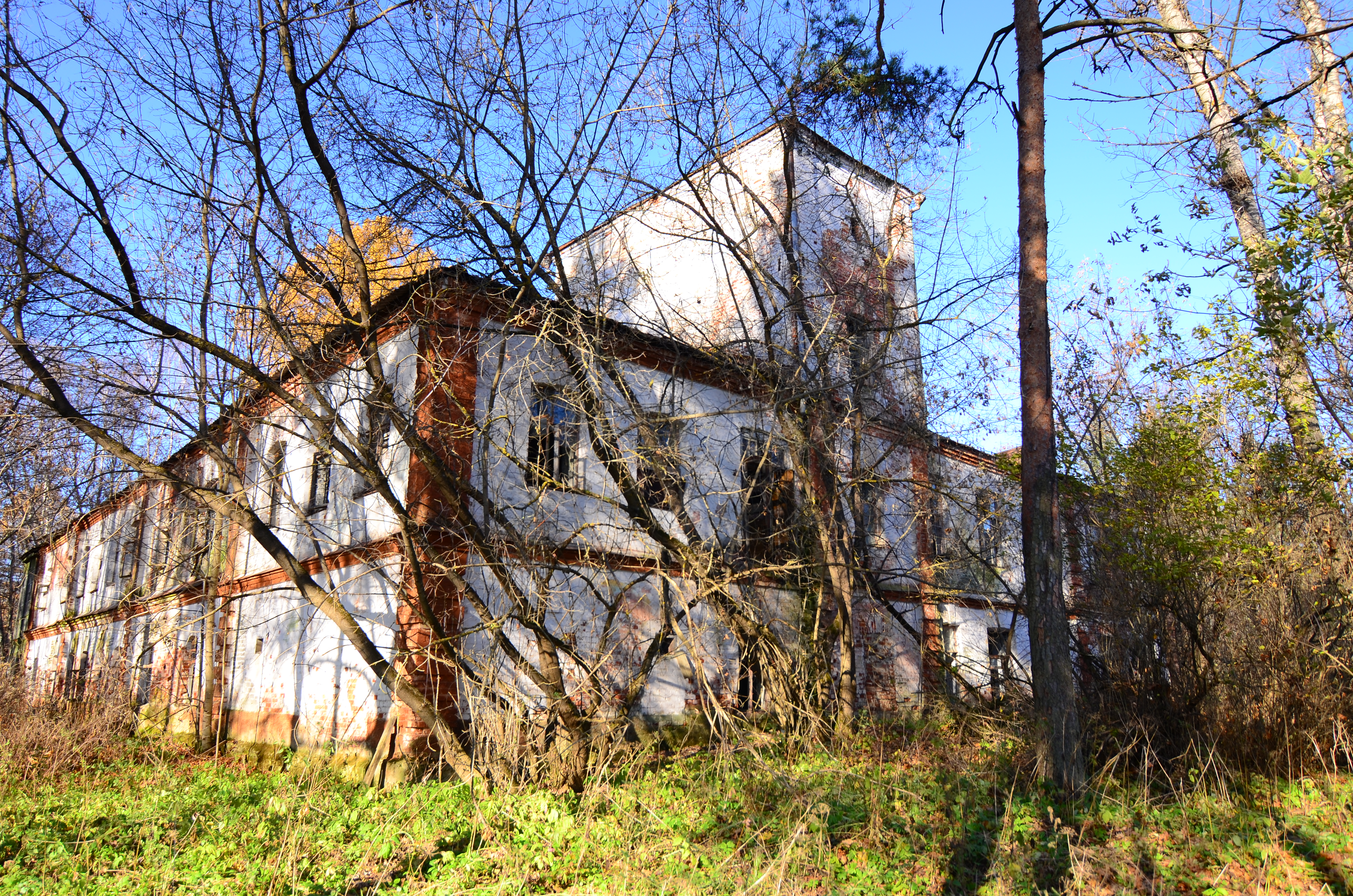 Дом для прислуги: Сушнево-1, Петушинский район, Владимирская область